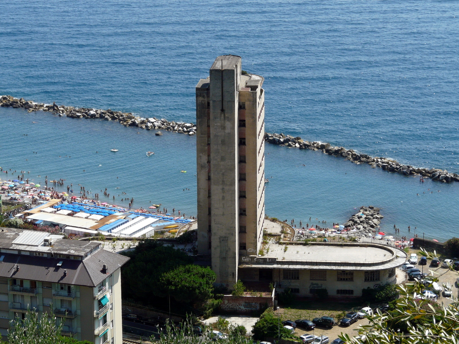 L'ex complesso della colonia Fara, Chiavari, Liguria, Italia